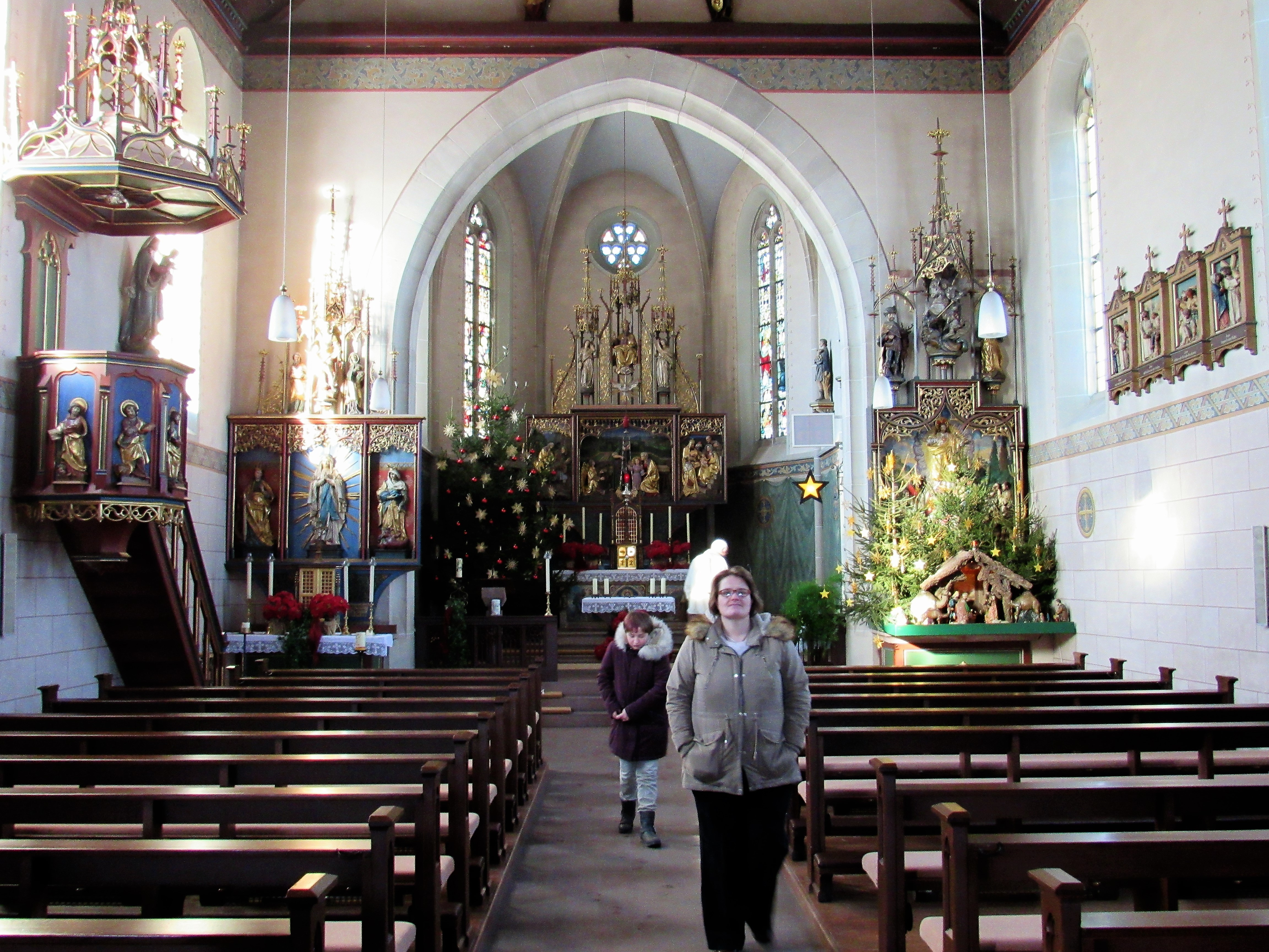 Kirche in Breitenbach